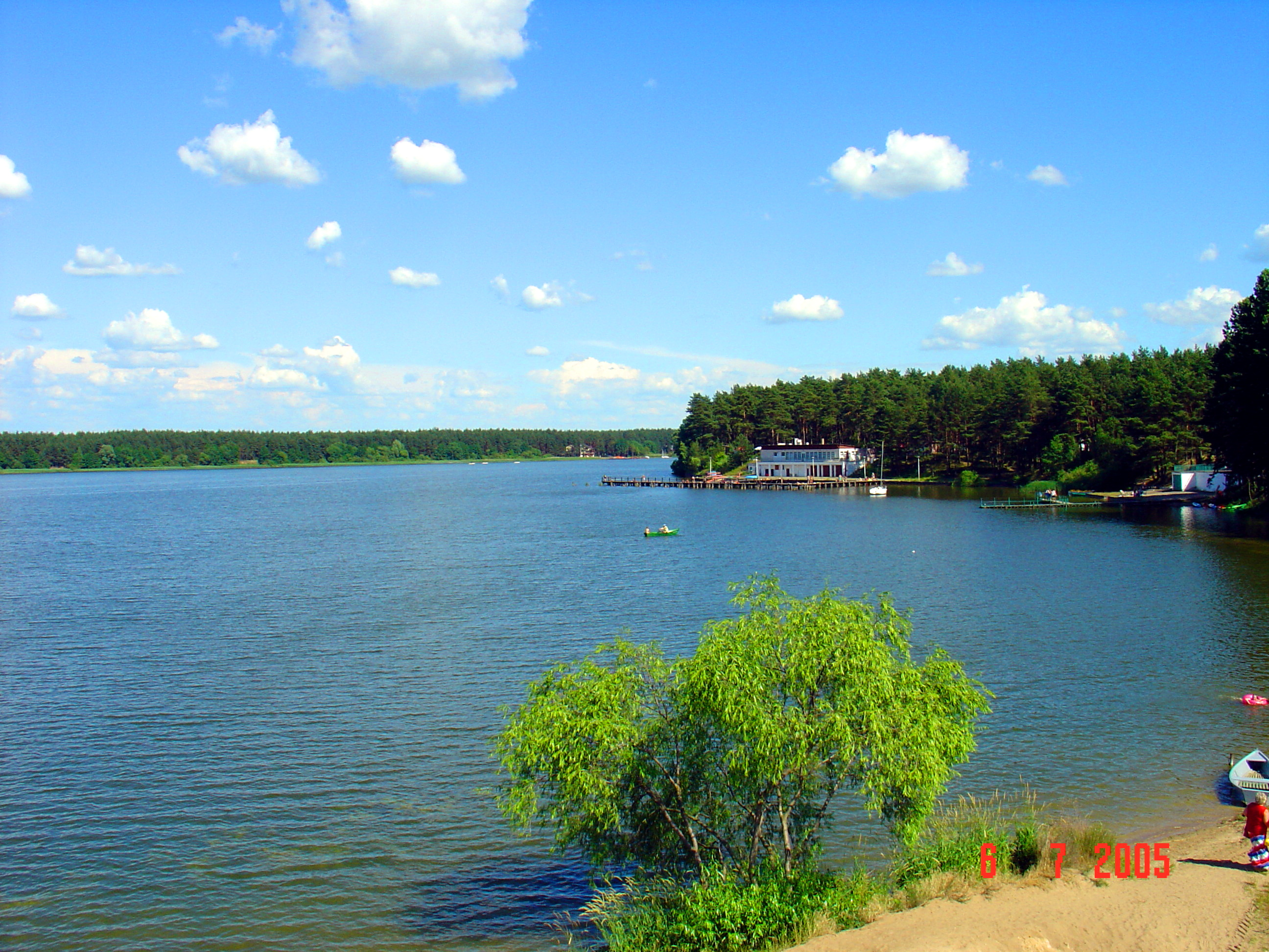 Jezioro Rajgrodzkie, widok z Czarnewsi na ośrodek Kormoran